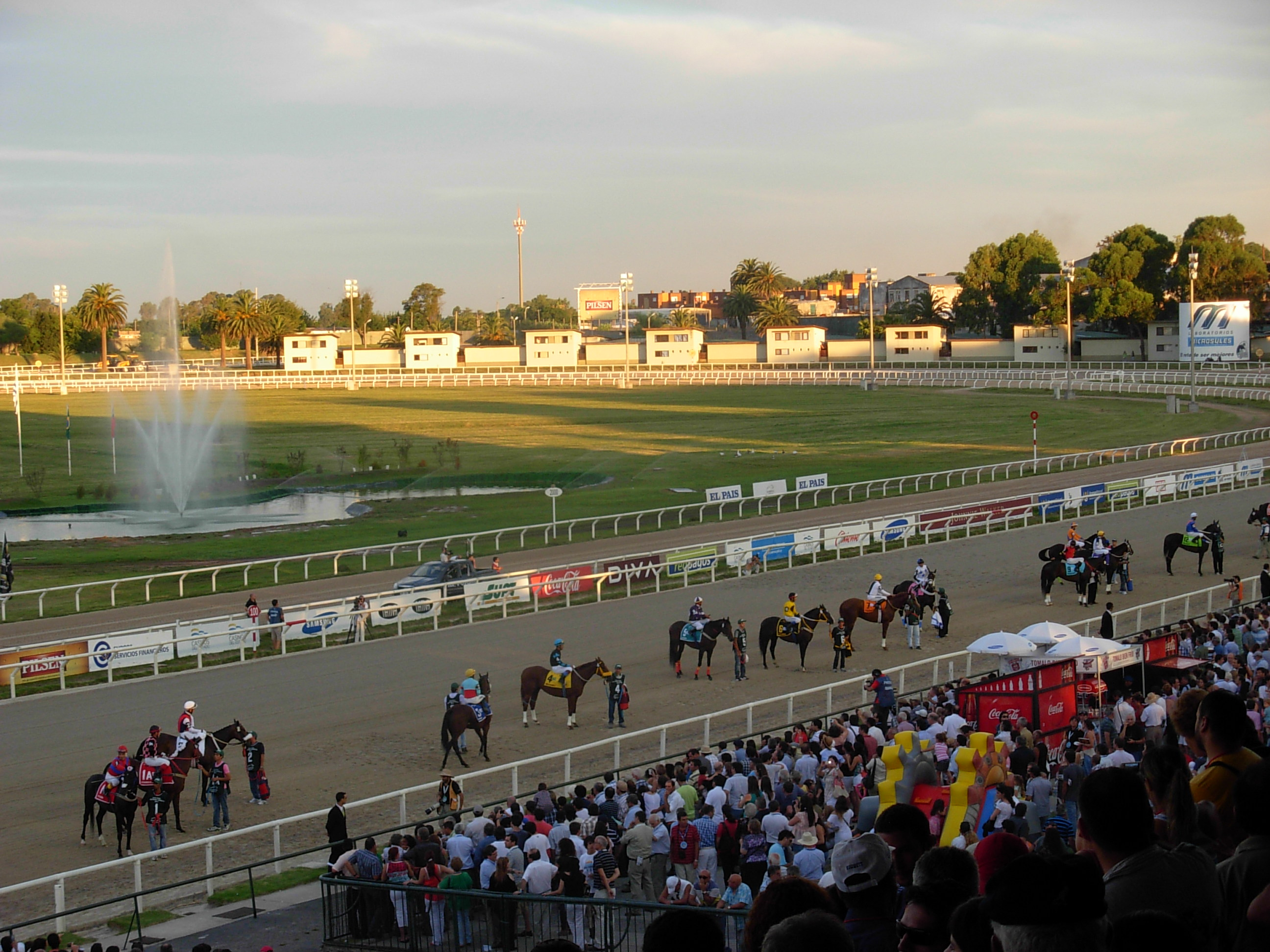 Desfile de competidores del Gran Premio José Pedro Ramírez 2013 en el Hipódromo Nacional de Maroñas en Montevideo, Uruguay rumbo a las gateras en la recta principal